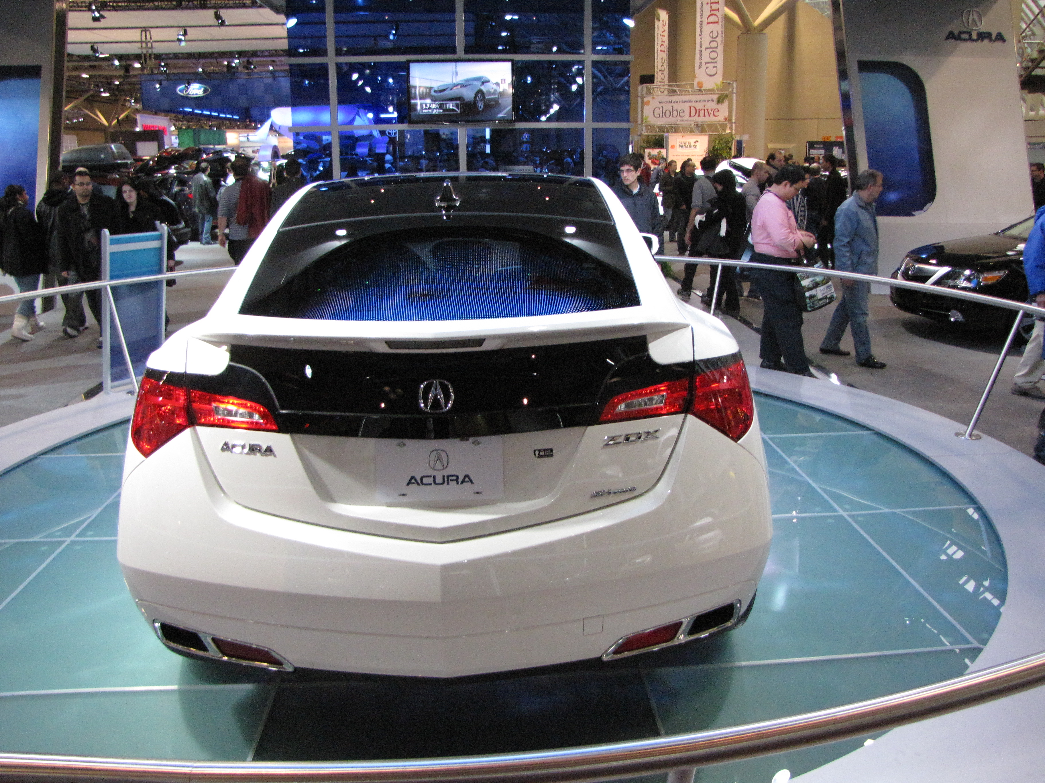 Acura ZDX